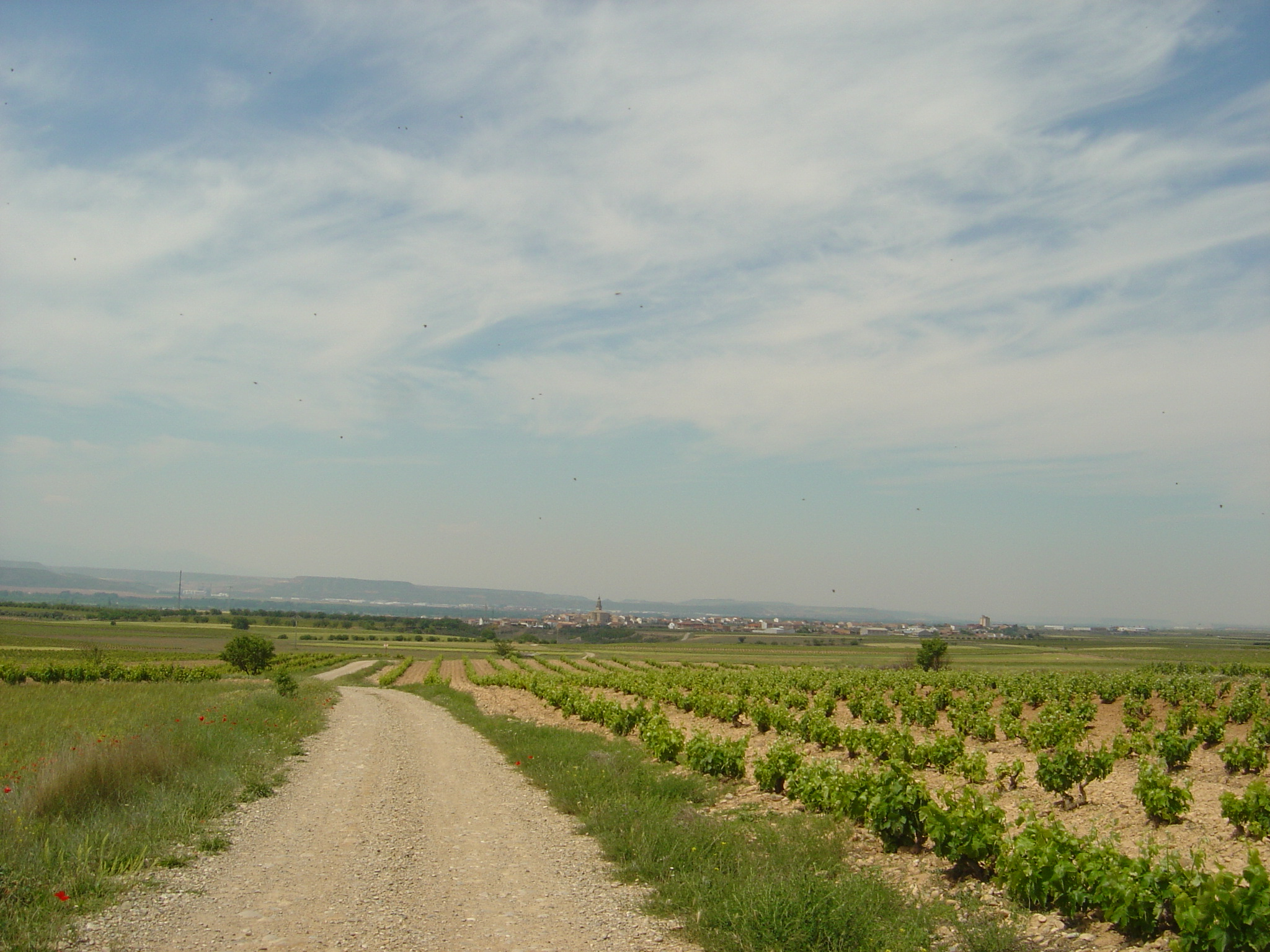 Mendavia. Navarra. Pueblo